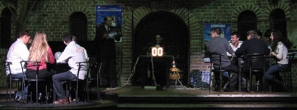 Игра в брейн-ринг Игра в брейн-ринг, турнир, спортивные соревнования, Играют команды Львова и Житомира